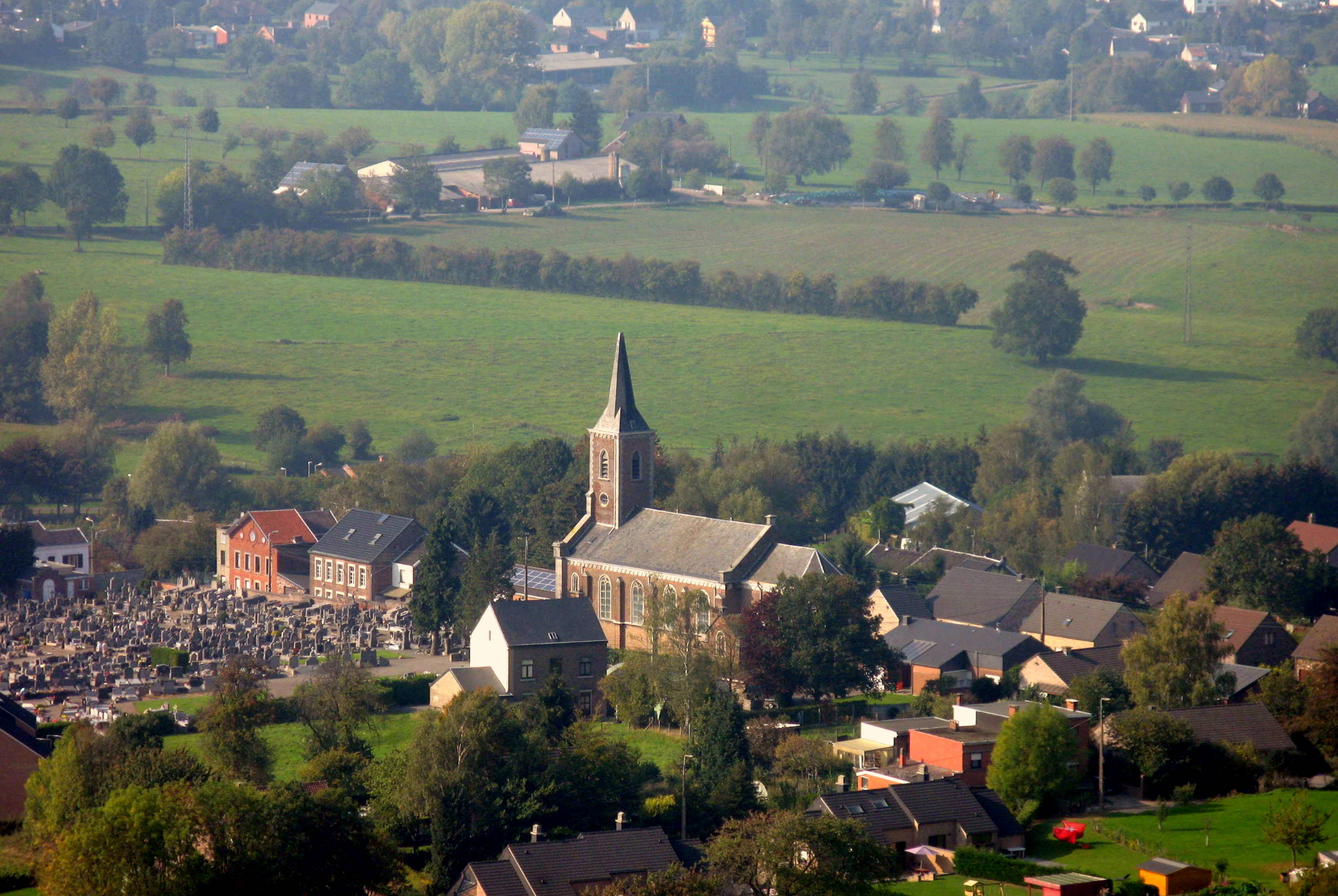 D'Kierch vu Retinne vum Hasard aus gesinn